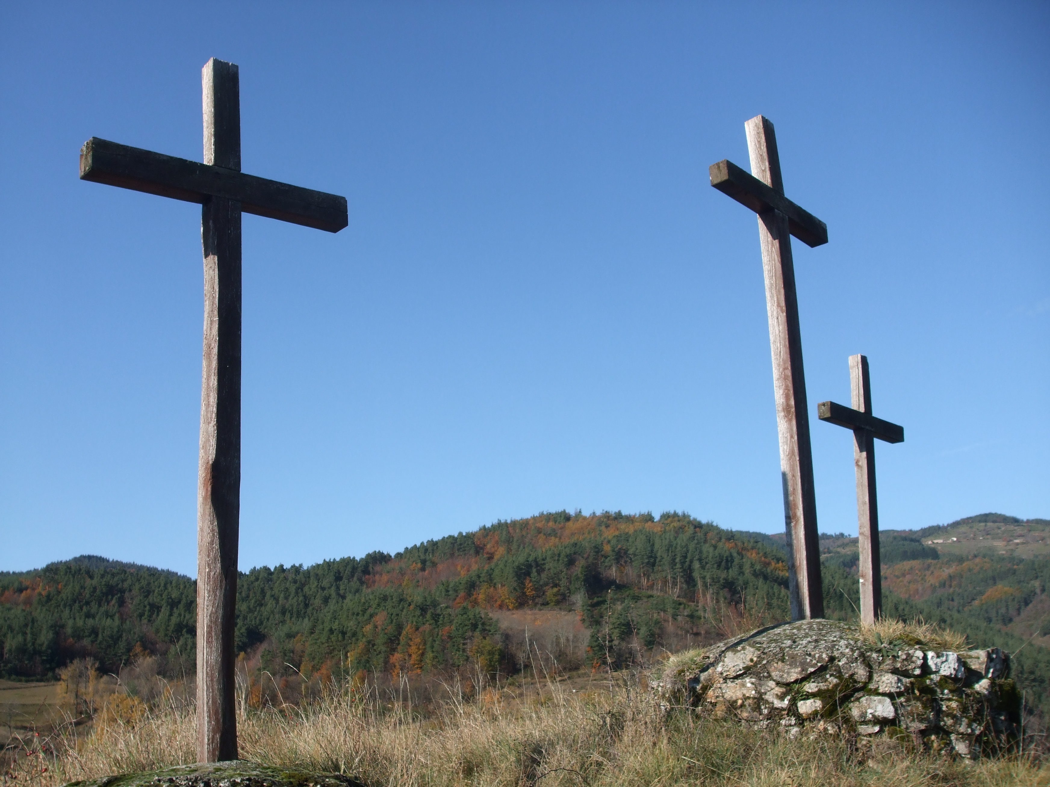 calvaire surplombant le village de Labatie d'Andaure